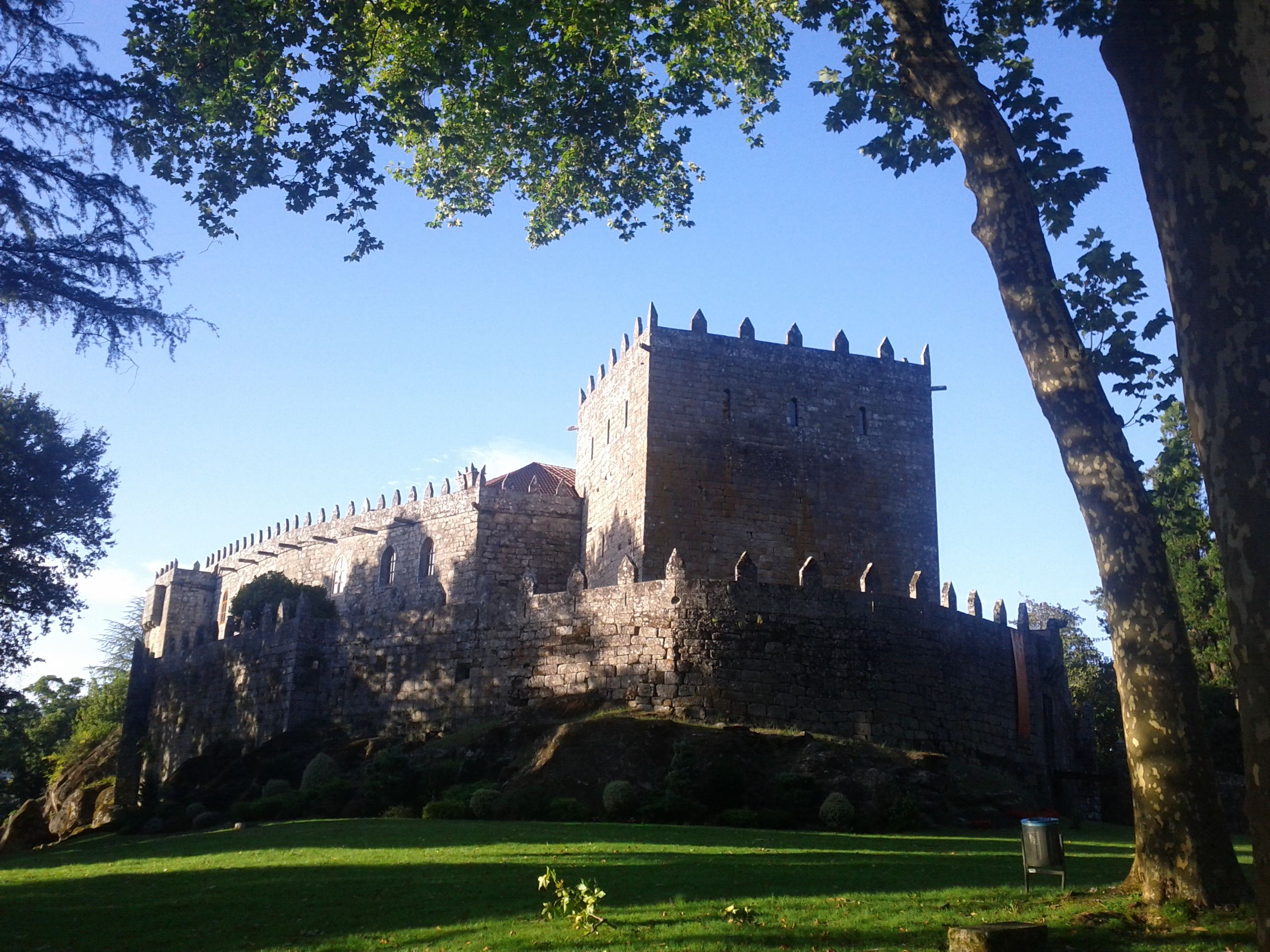 Castillo de Sotomayor This photo was uploaded with Wiki Loves Monuments mobile 1.2.1 (Android).